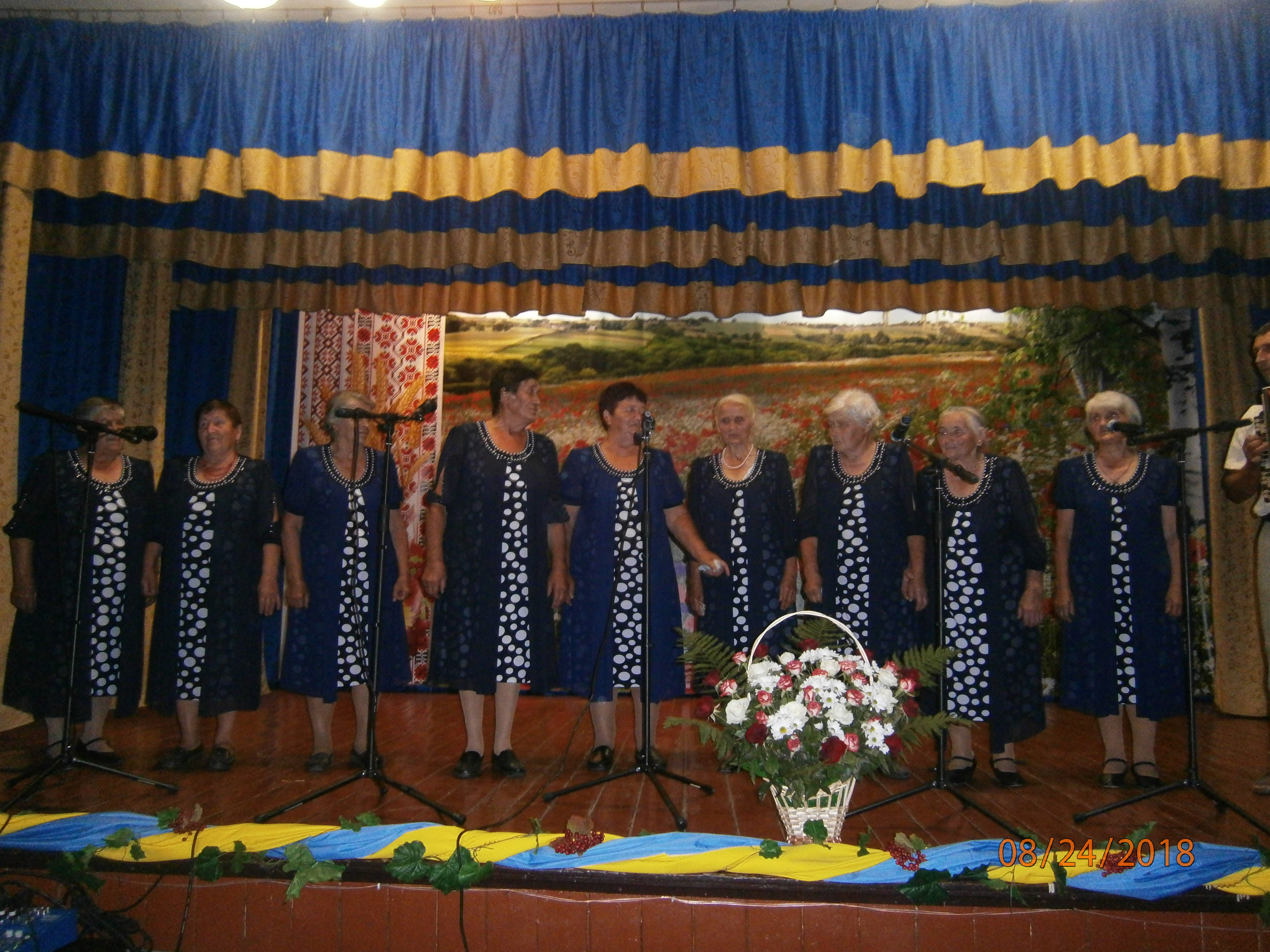 Вокальний ансамбль "Калина" Просянського будинку культури в первинному складі існує понад 50 років.